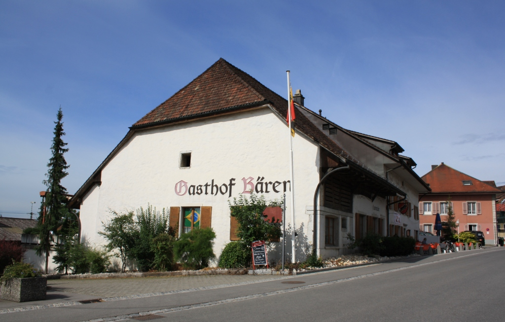 Gasthof Bären, Attiswil